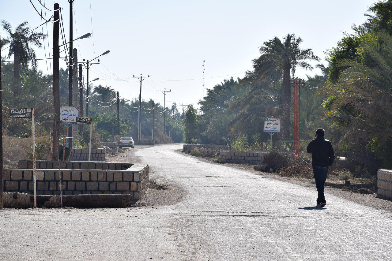 روستا شلهه امام حسن عسگری